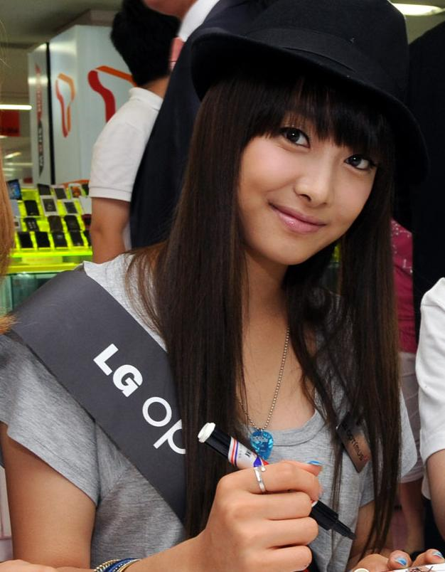 인기그룹 f(x), LG 옵티머스Z 띄우기 본격 나섰다